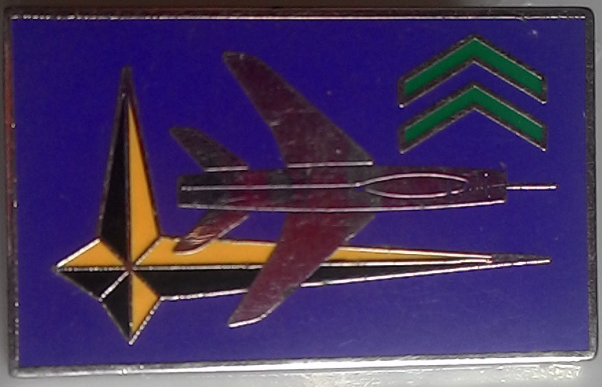 insigne de la base aérienne 136 de Toul Rosière